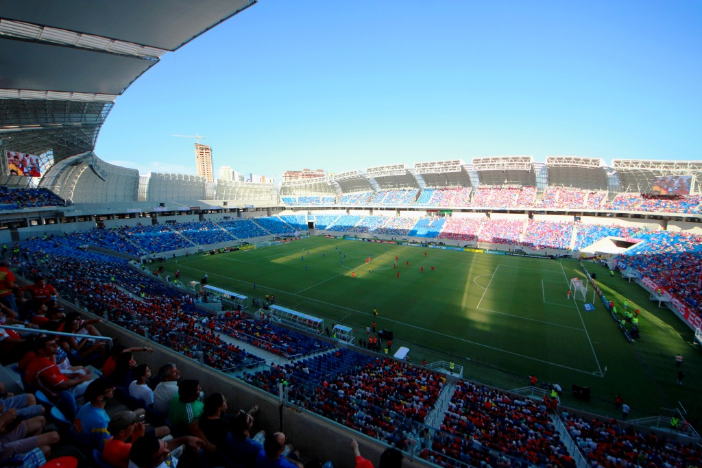 Arena das Dunas em partida inaugural, 26 de janeiro de 2014.